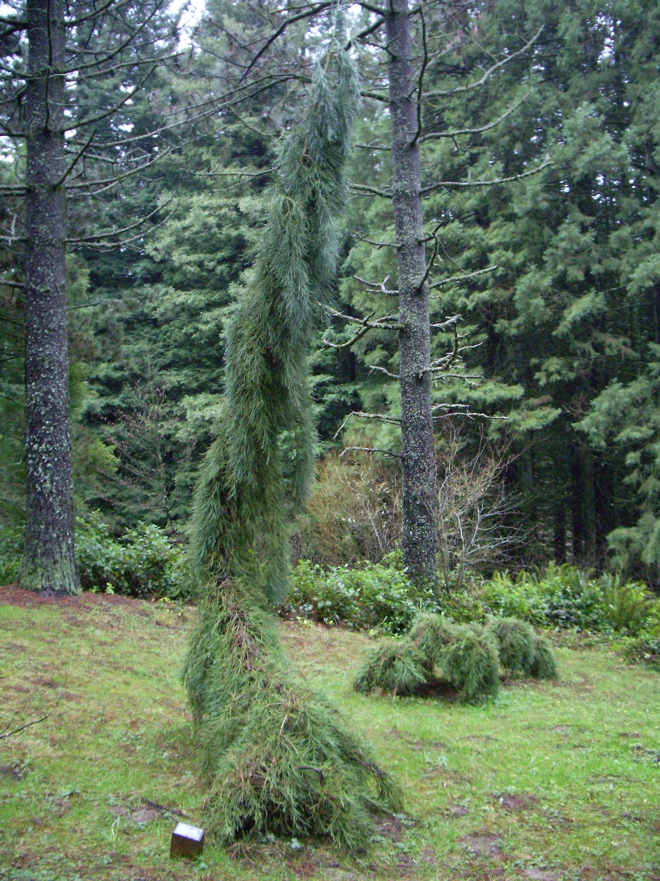 A Weeping Sequoia (Sequoiadendron giganteum 'Pendulum') in Hoyt Arboretum